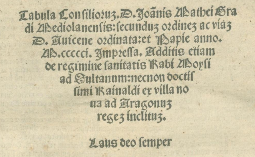 Title page of 1501 diet book: de Gradi (da Grado), Moyses (Maimonides), Rainaldus (Arnaldus de Villanova)